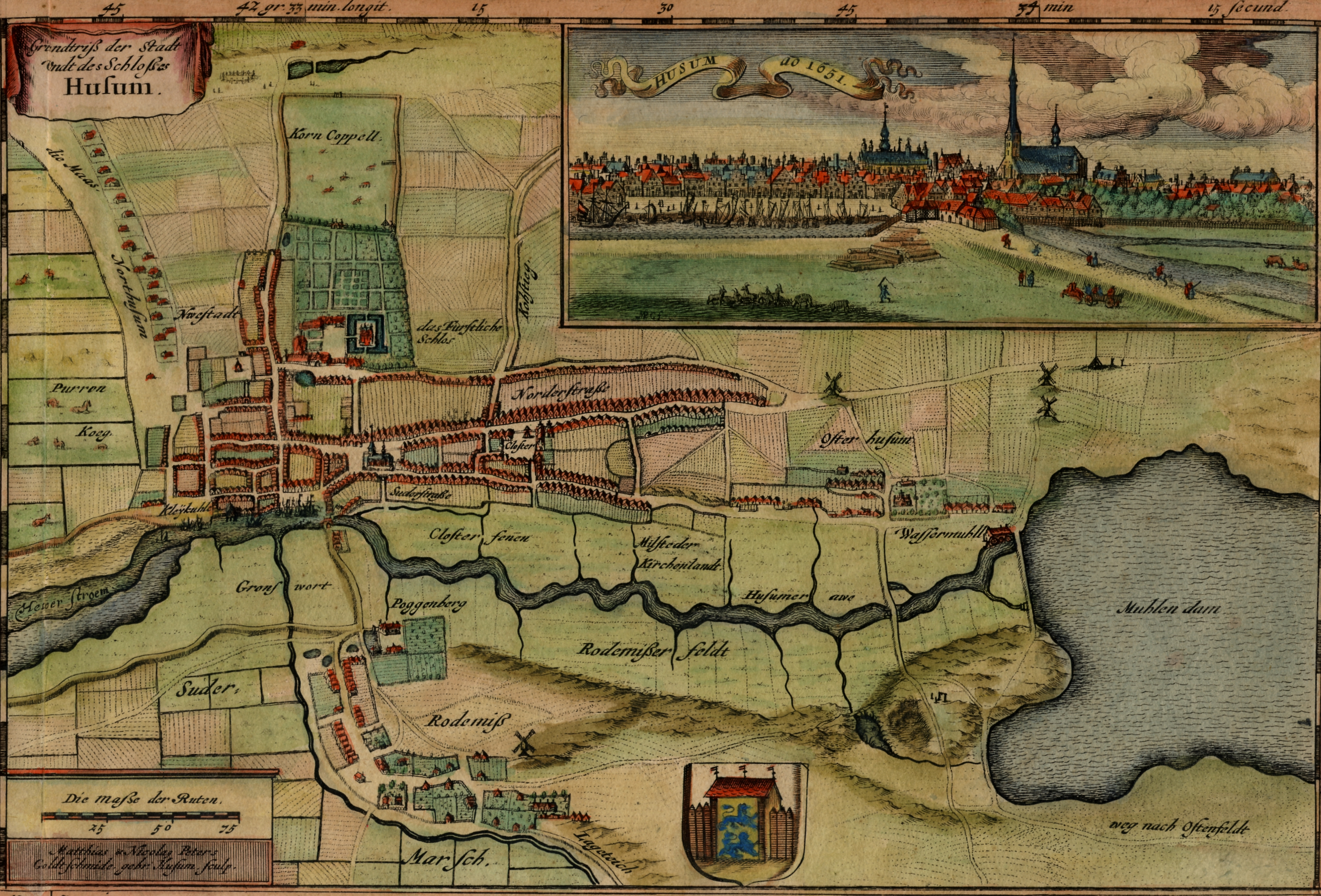 Karte von Husum, Druck, handkoloriert